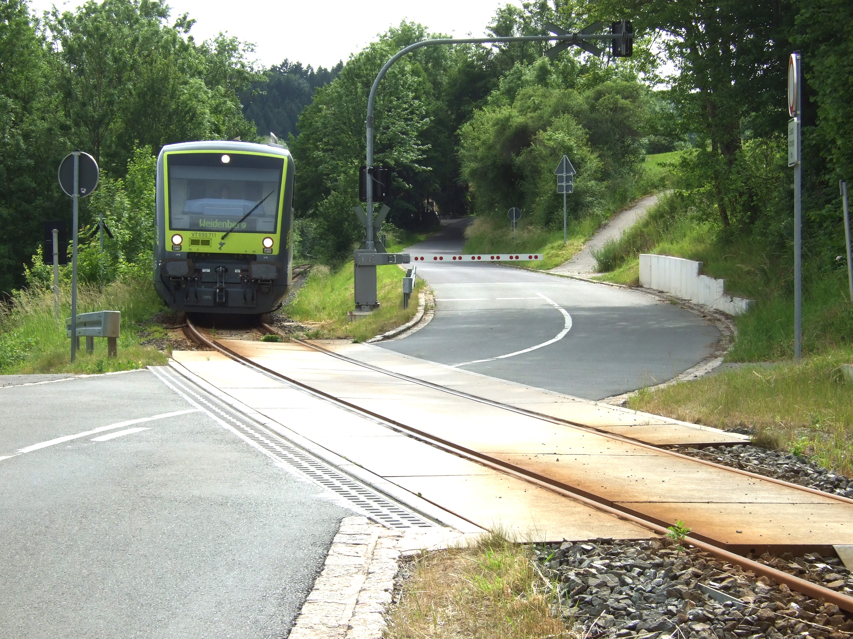 Stadler Regio-Shuttle RS1 in Döhlau bei Bayreuth